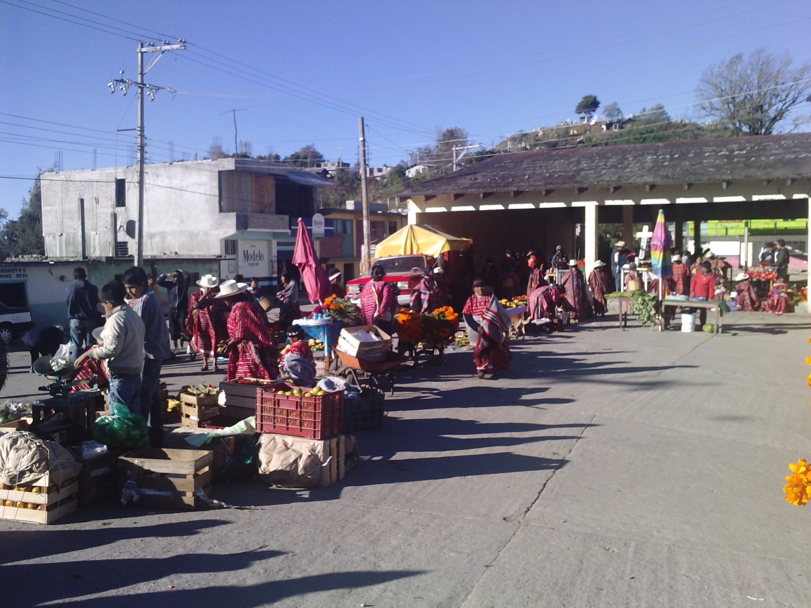 Lunes de tianguis en San Andrés Chicahuaxtla